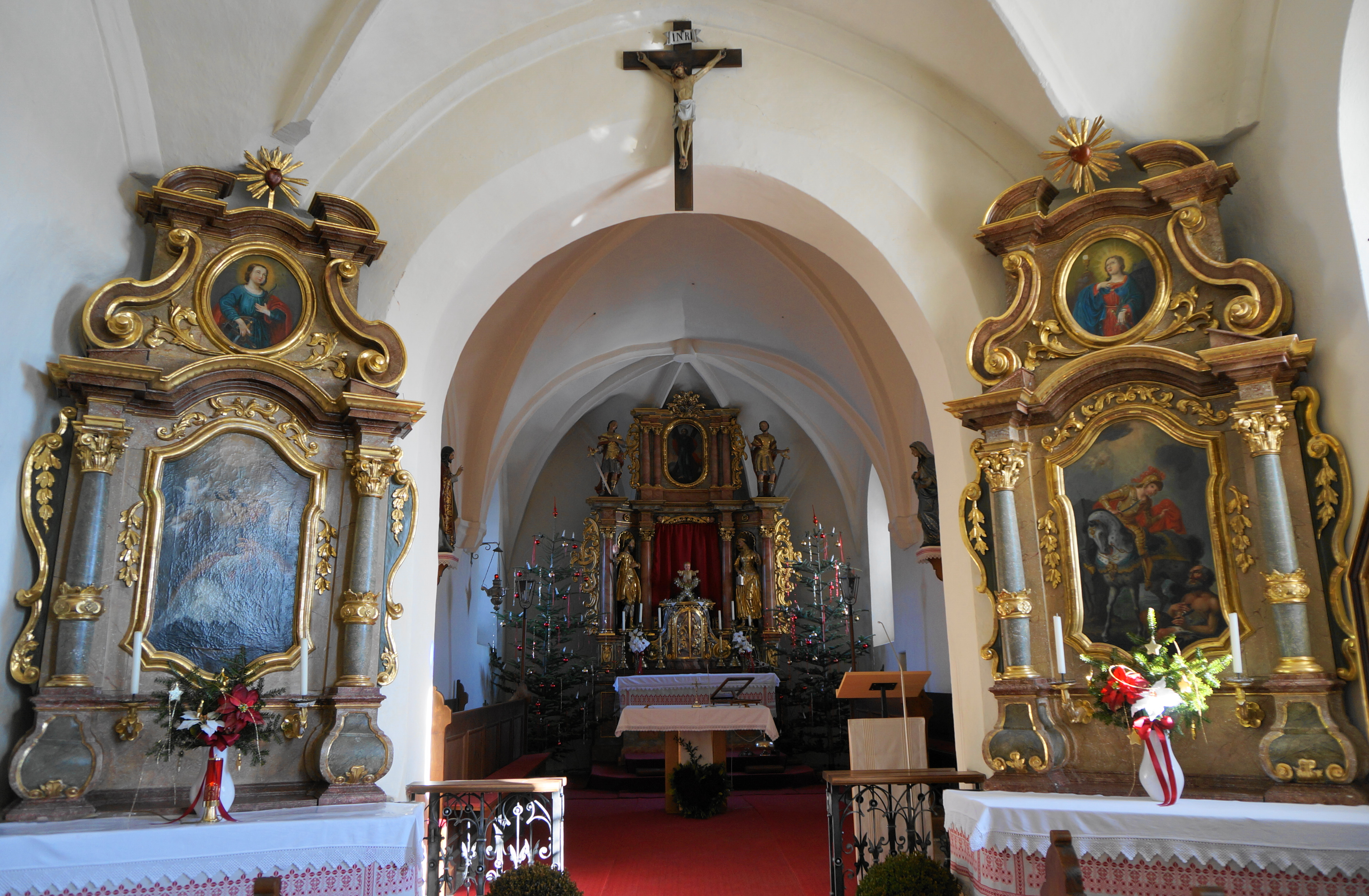 Kath. Pfarrkirche hl. Magdalena und Friedhof